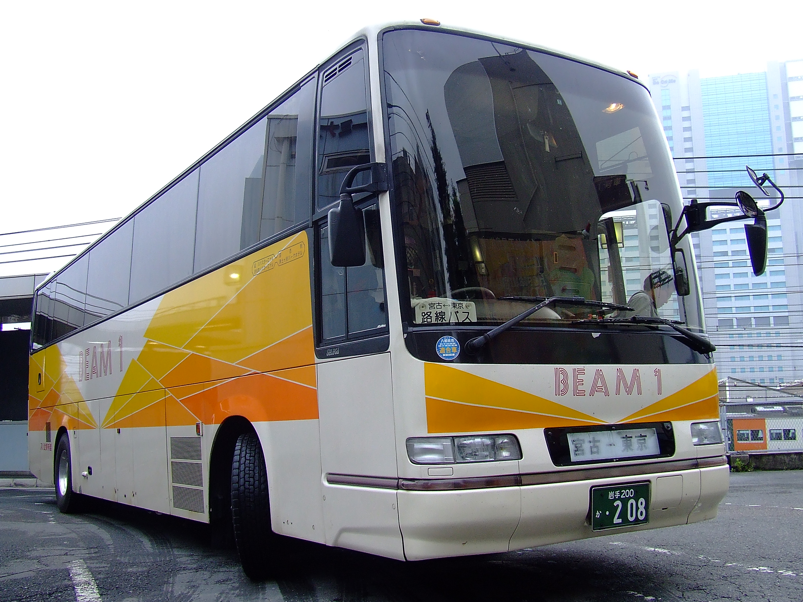 岩手県北バスの夜行高速バス「ビーム・１」 品川バスターミナルにて